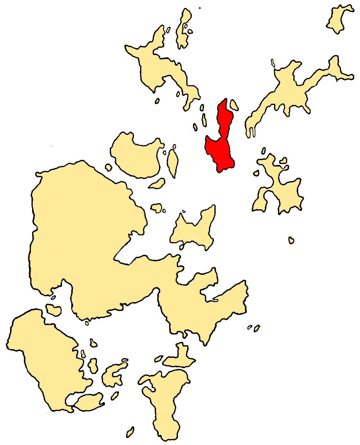 Eday